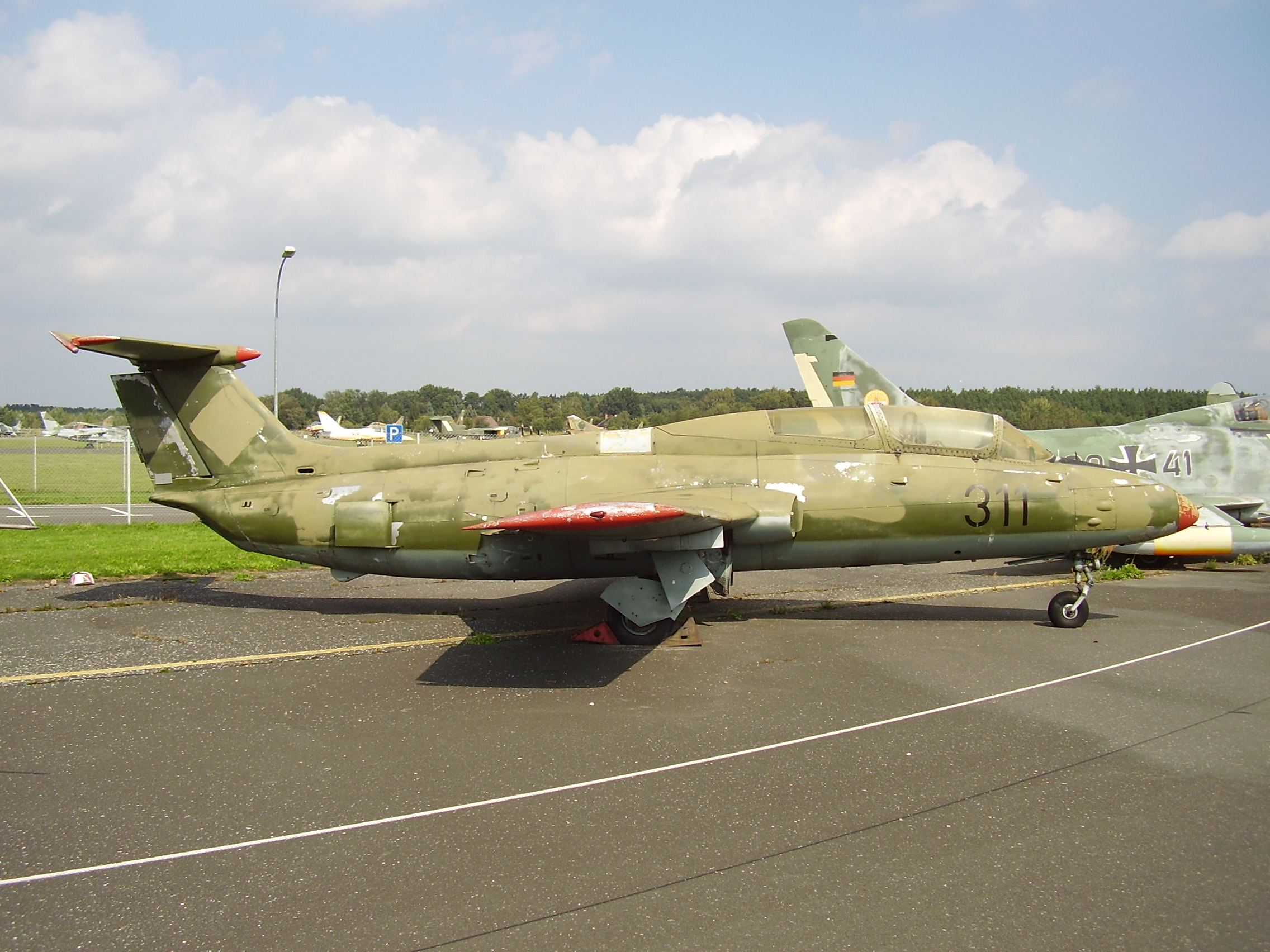 Luftwaffenmuseum der Bundeswehr; Airforce Museum of the Bundeswehr; Berlin-Gatow